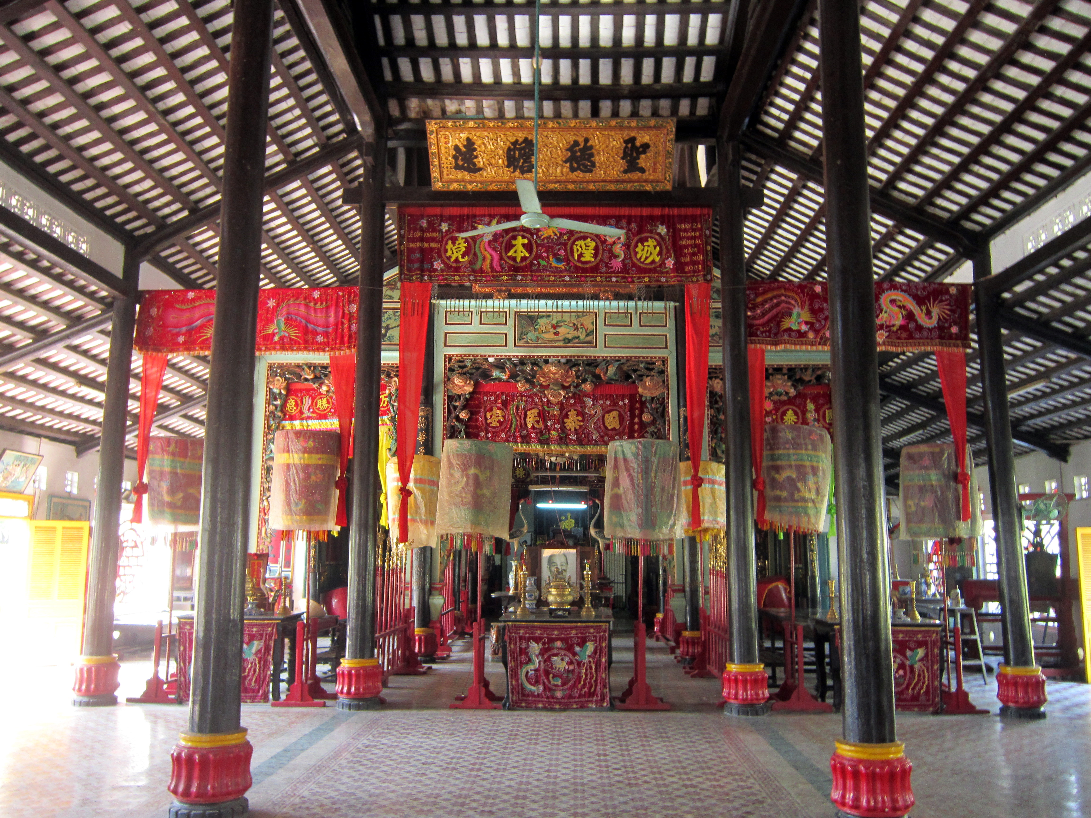 Bên trong đình Mỹ Phước ở thành phố Long Xuyên, An Giang, Việt Nam.